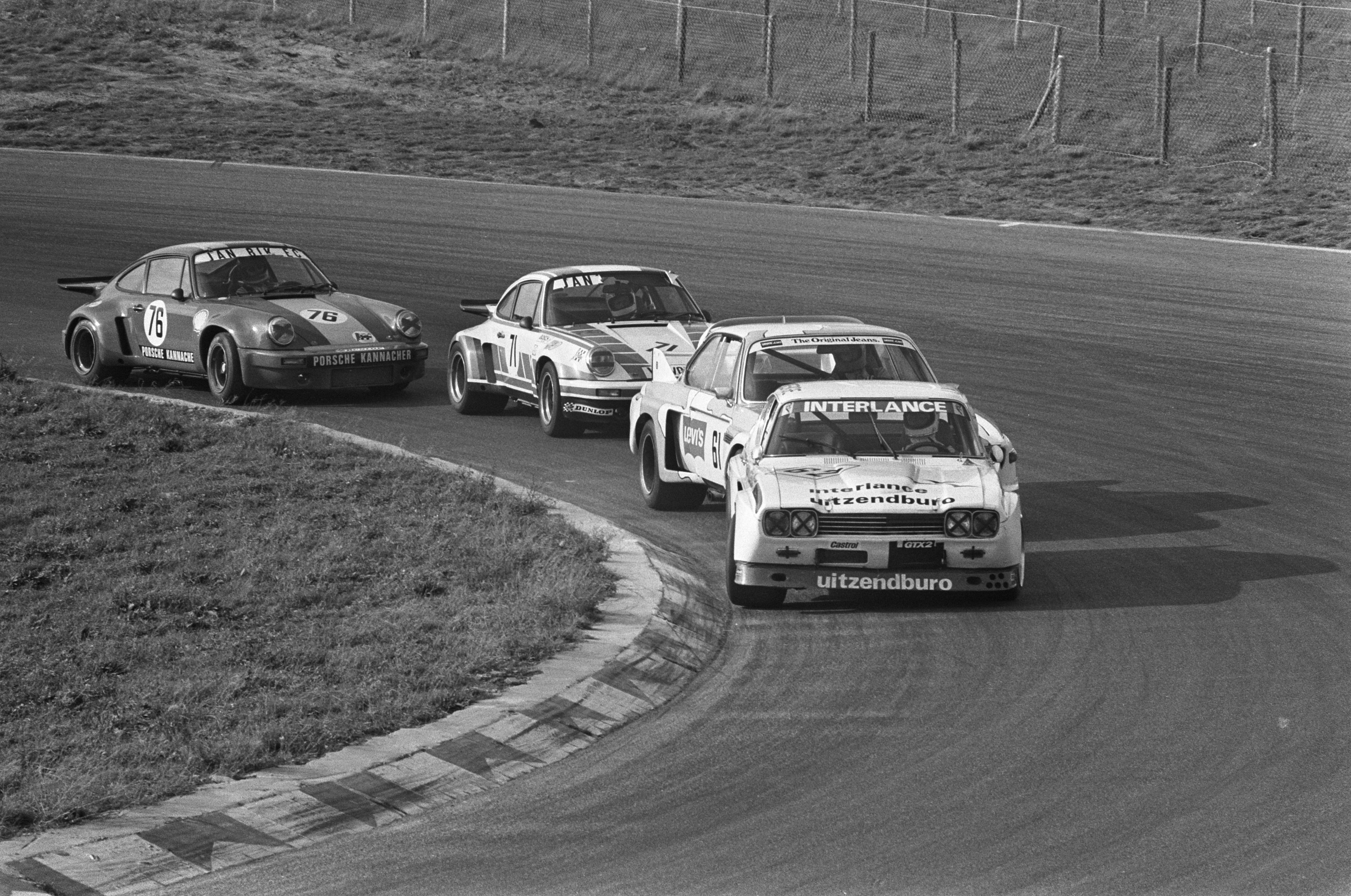 Collectie / Archief : Fotocollectie Anefo Reportage / Serie : [ onbekend ] Beschrijving : Autoraces op Zandvoort; overzicht toerwagens Datum : 5 oktober 1975 Locatie : Noord-Holland, Zandvoort Trefwoorden : AUTORACES Fotograaf : Peters, Hans / Anefo Auteursrechthebbende : Nationaal Archief Materiaalsoort : Negatief (zwart/wit) Nummer archiefinventaris : bekijk toegang 2.24.01.05 Bestanddeelnummer : 928-1879